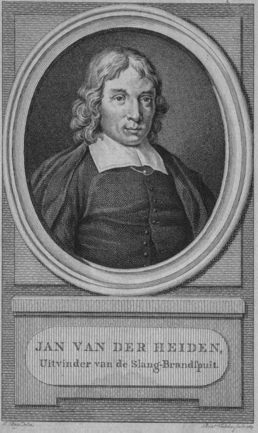 Portrait of Jan van der Heiden (1637-1712)